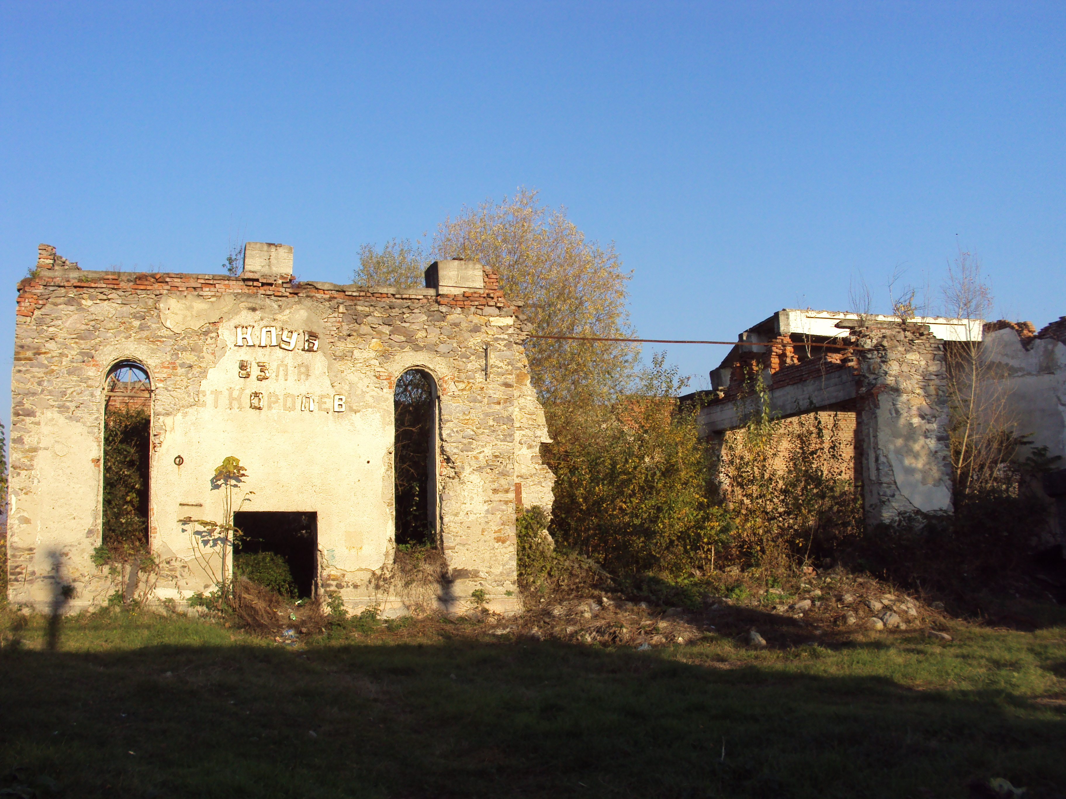 Руины Новой синагоги в Королево (Виноградовский район, Закарпатье)